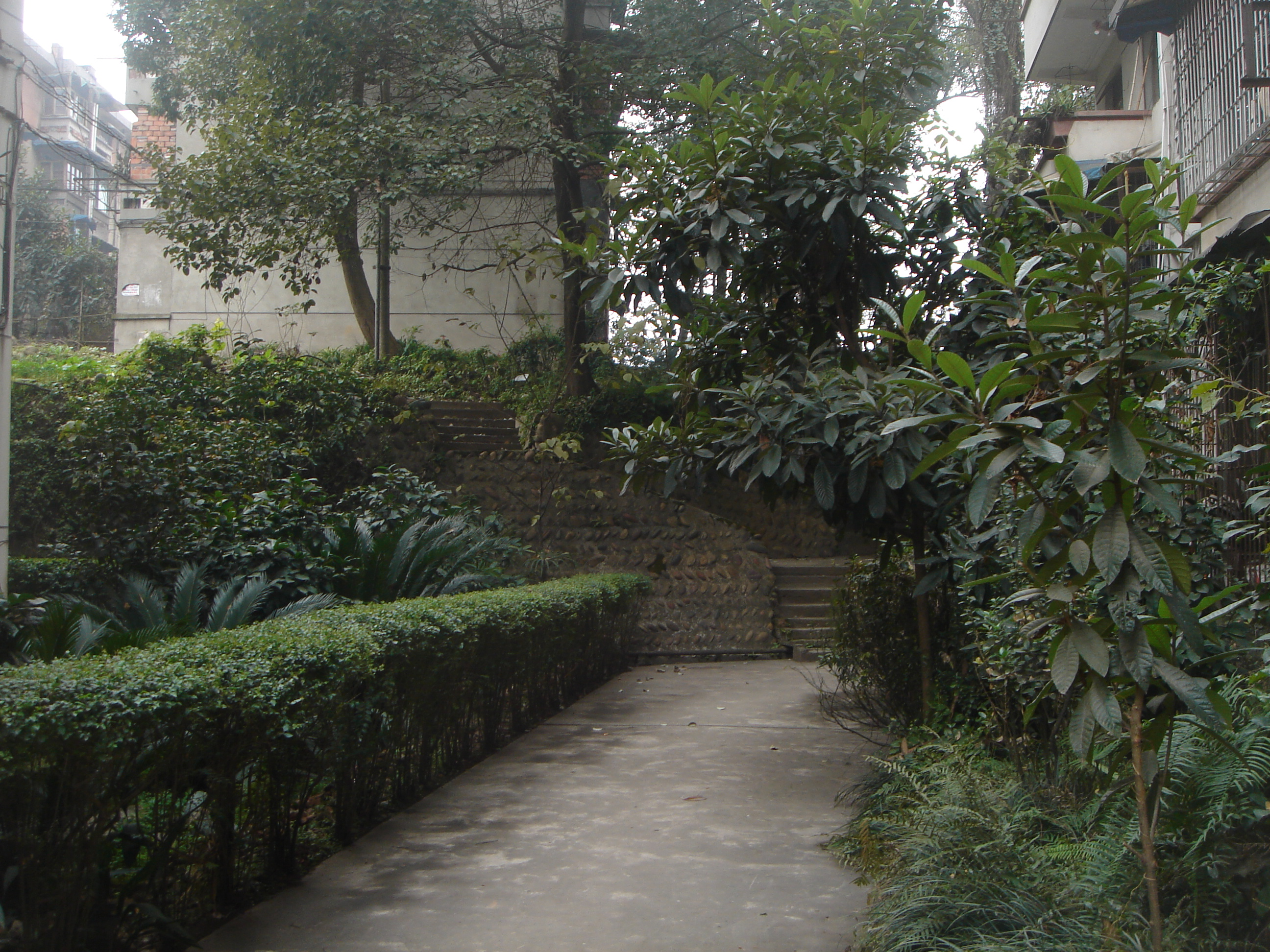 中文（新加坡）: 乐达社区原605厂职工宿舍楼